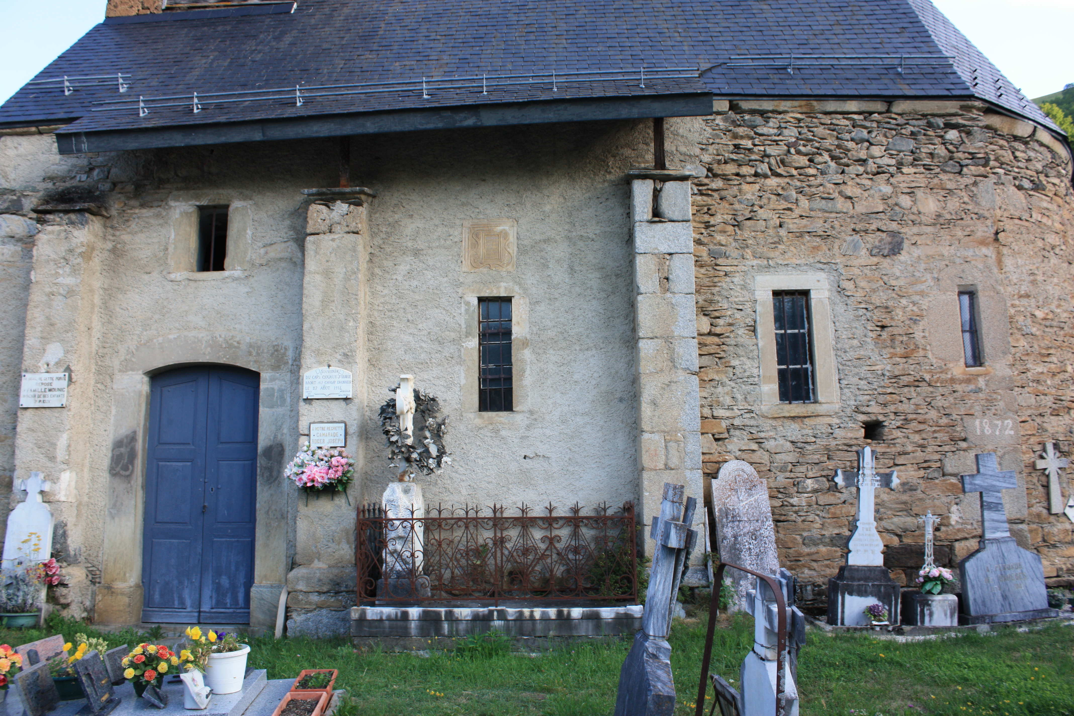 Billière - Eglise Saint-Barthélémy